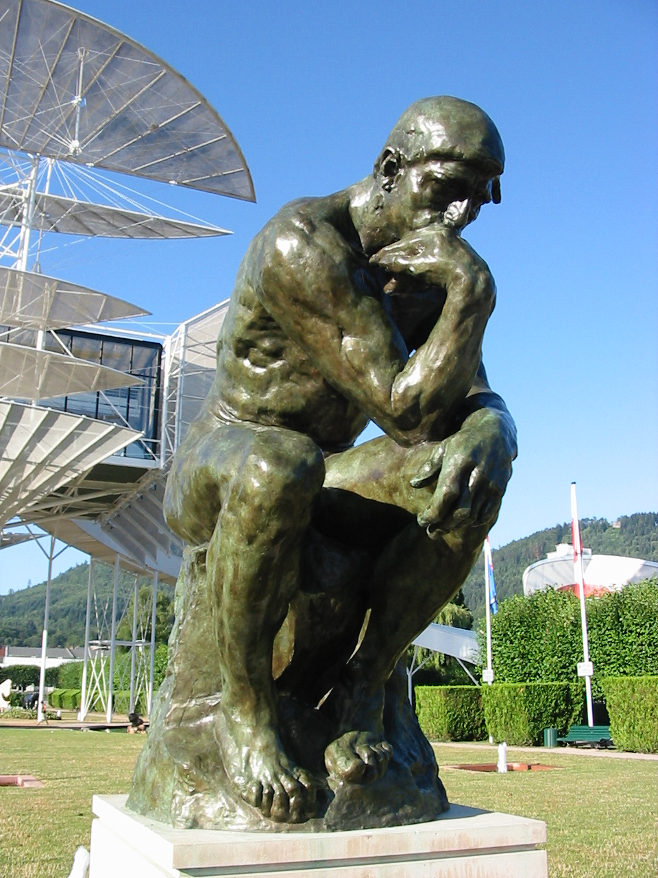 Le Penseur, d'Auguste Rodin. H. : 180 cm ; L. : 96,5 cm ; P. : 140,5 cm Bronze Reproduction 25 exemplaires Coll. Prince Dolgorouki Exposition à Saint-Dié-des-Vosges "Sculptures monumentales des Maîtres du XXe siècle" du 14 juillet au 10 octobre 2010.